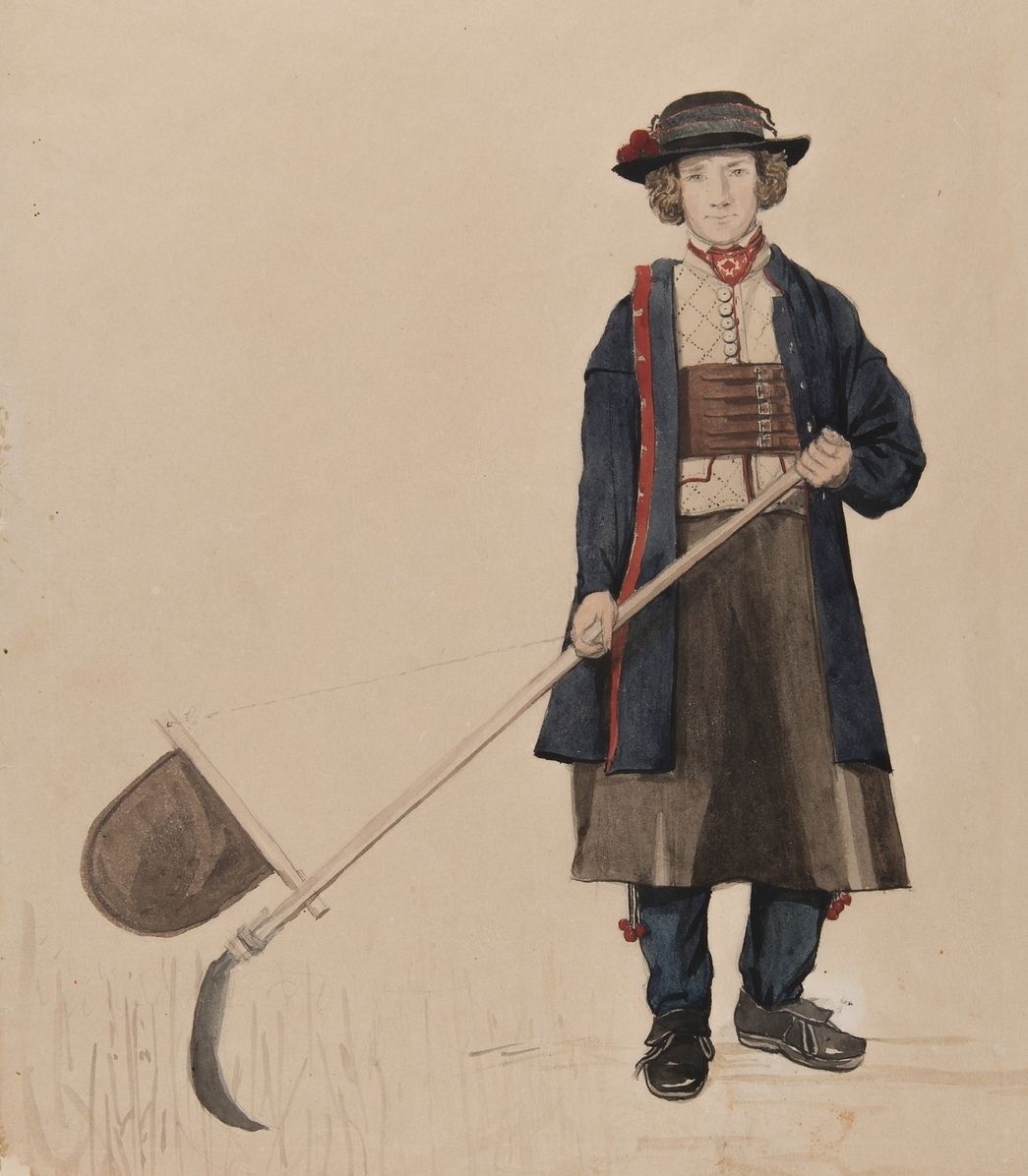 Pojke i Rättviksdräkt med lie (med fång). Akvarell av P.Södermark. Depicted place: Q10658557 (Q10658557)